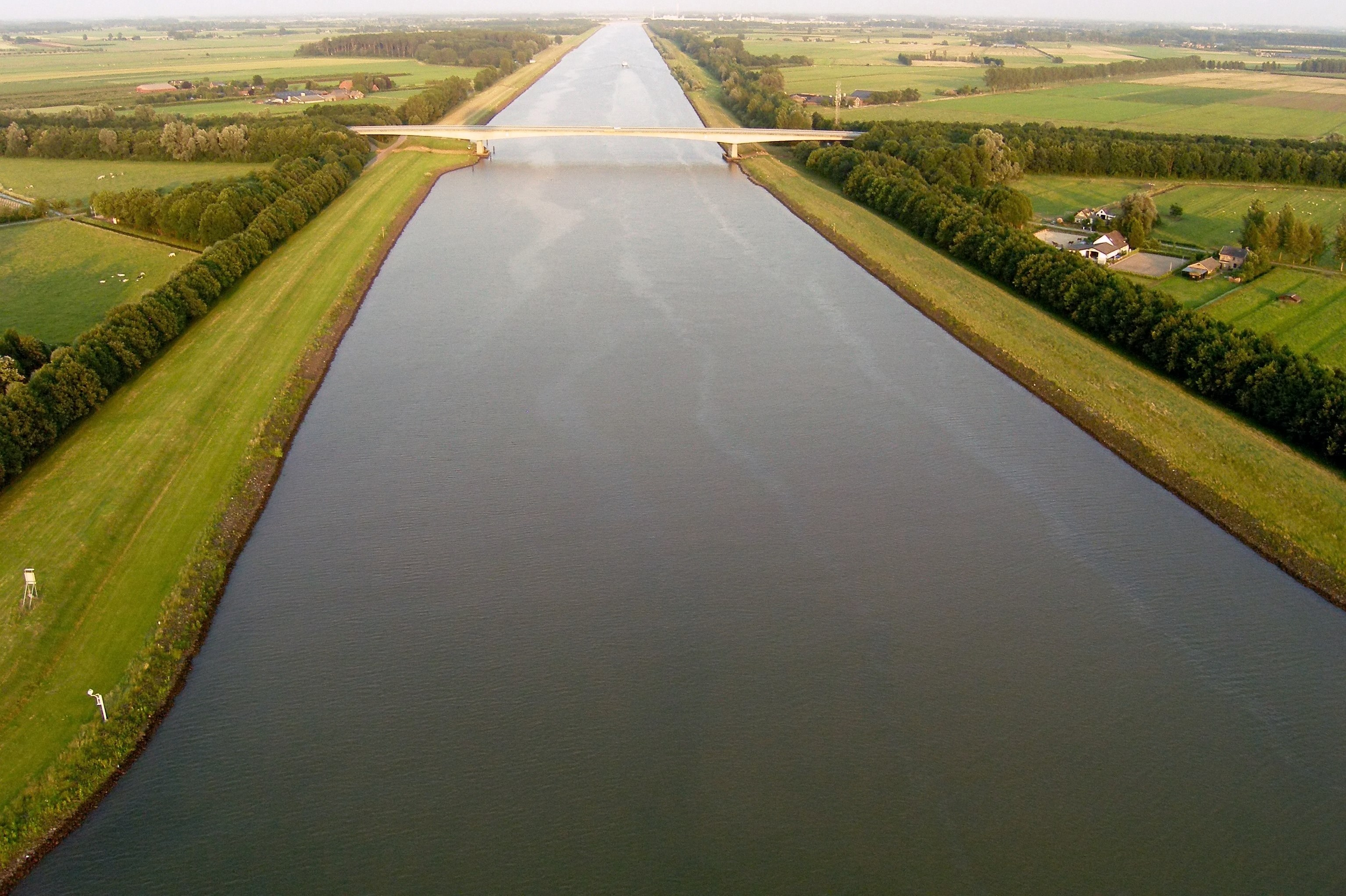 The Amsterdam-Rijnkanaal near Rijswijk (Gelderland). The bridge is the provincial road N320.